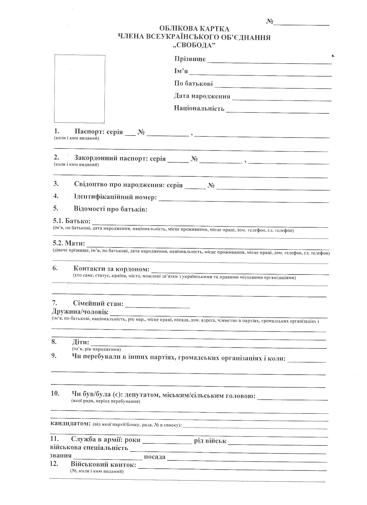 Анкета для бажаючих вступити до ВО "Свобода". Стр.1